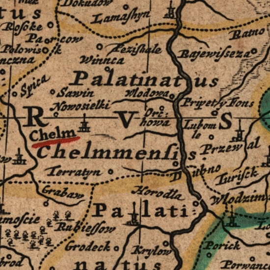 Terra (Palatinatus) Chelmensis, Polonia, ca. 1690.